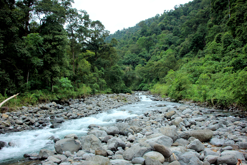 Kuranji Segmen Hulu